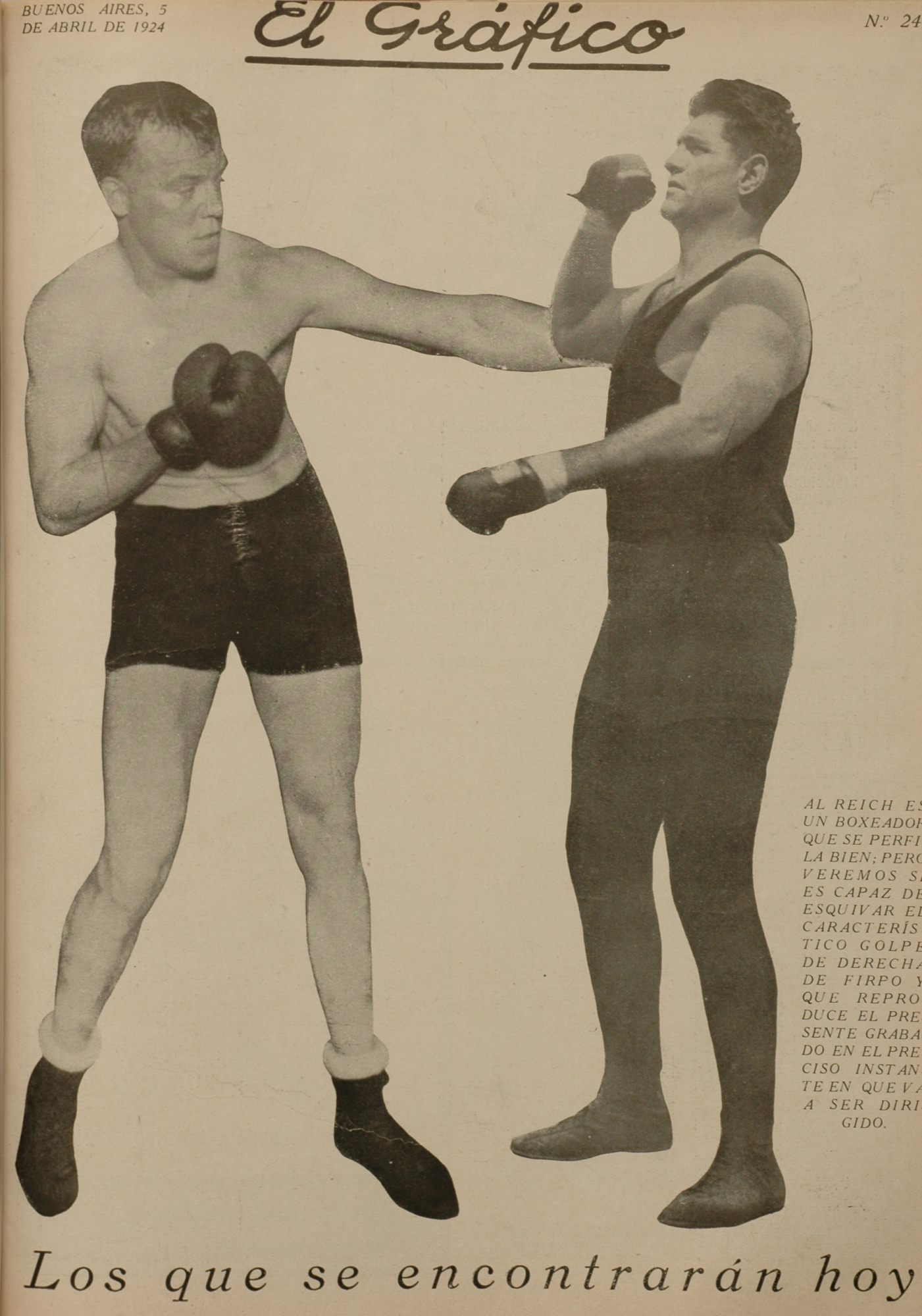 El Grafico del 05 de Abril de 1924. Edicion 249